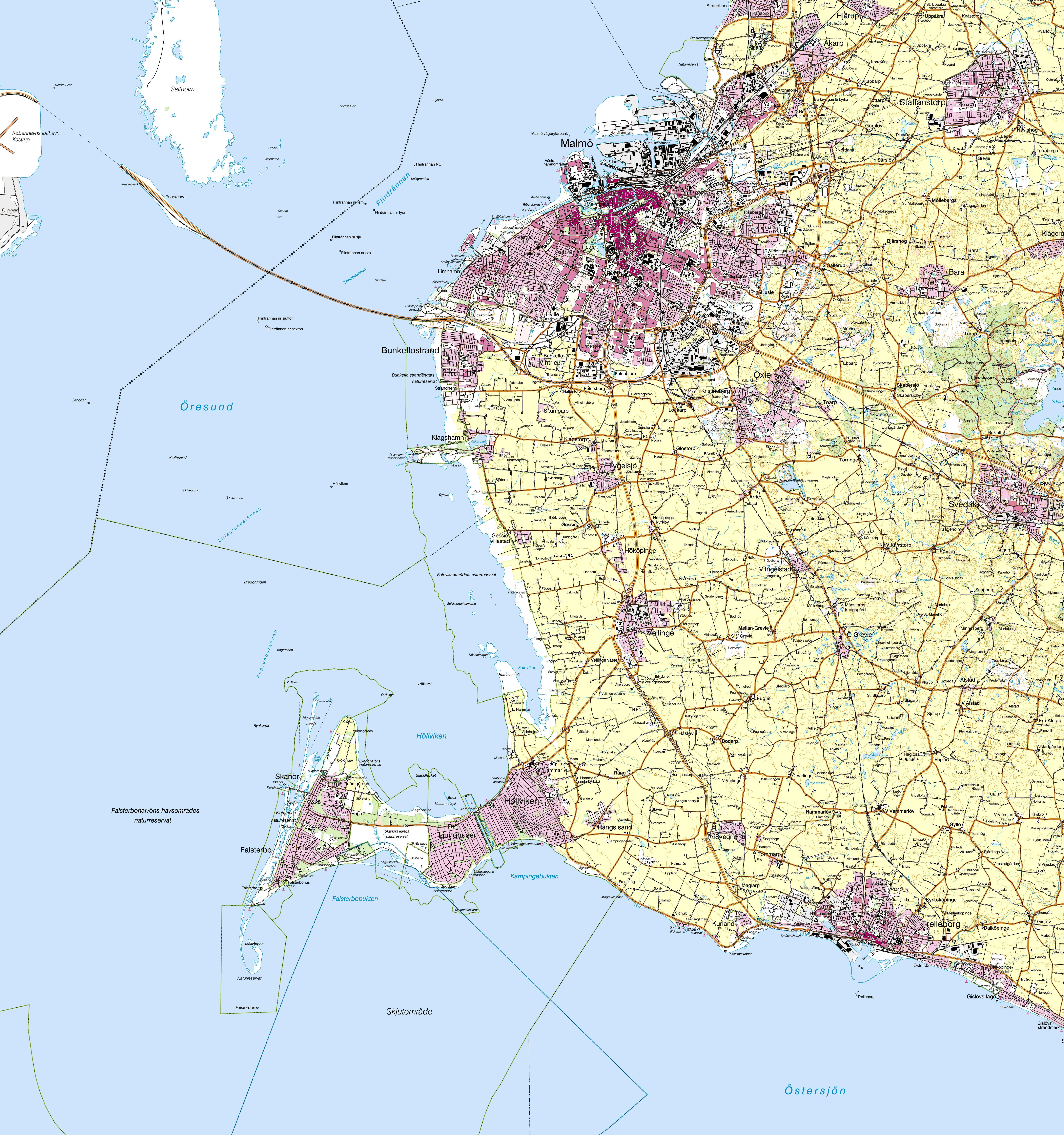 501 Malmö. Kartdata: Lantmäteriet, licens CC BY.